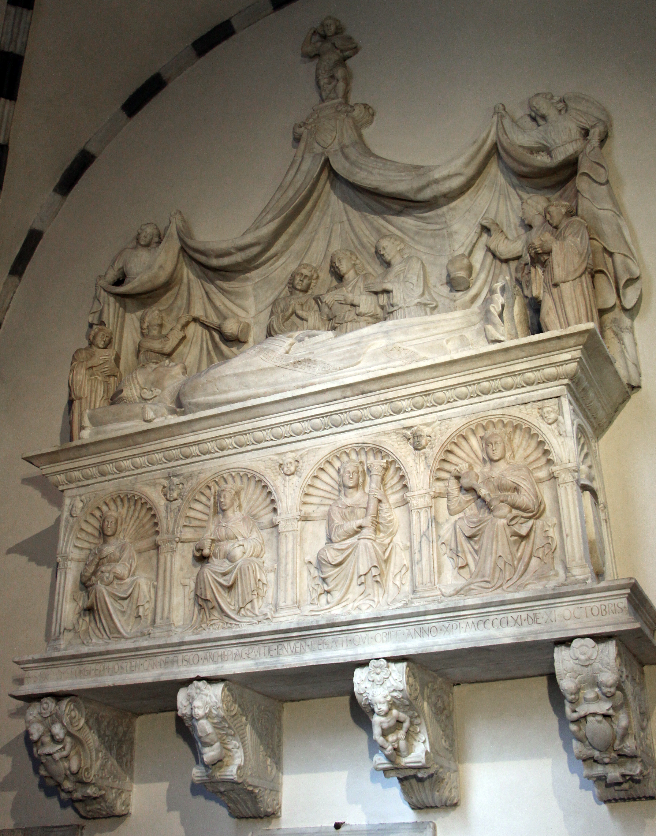 San Lorenzo (Genova)